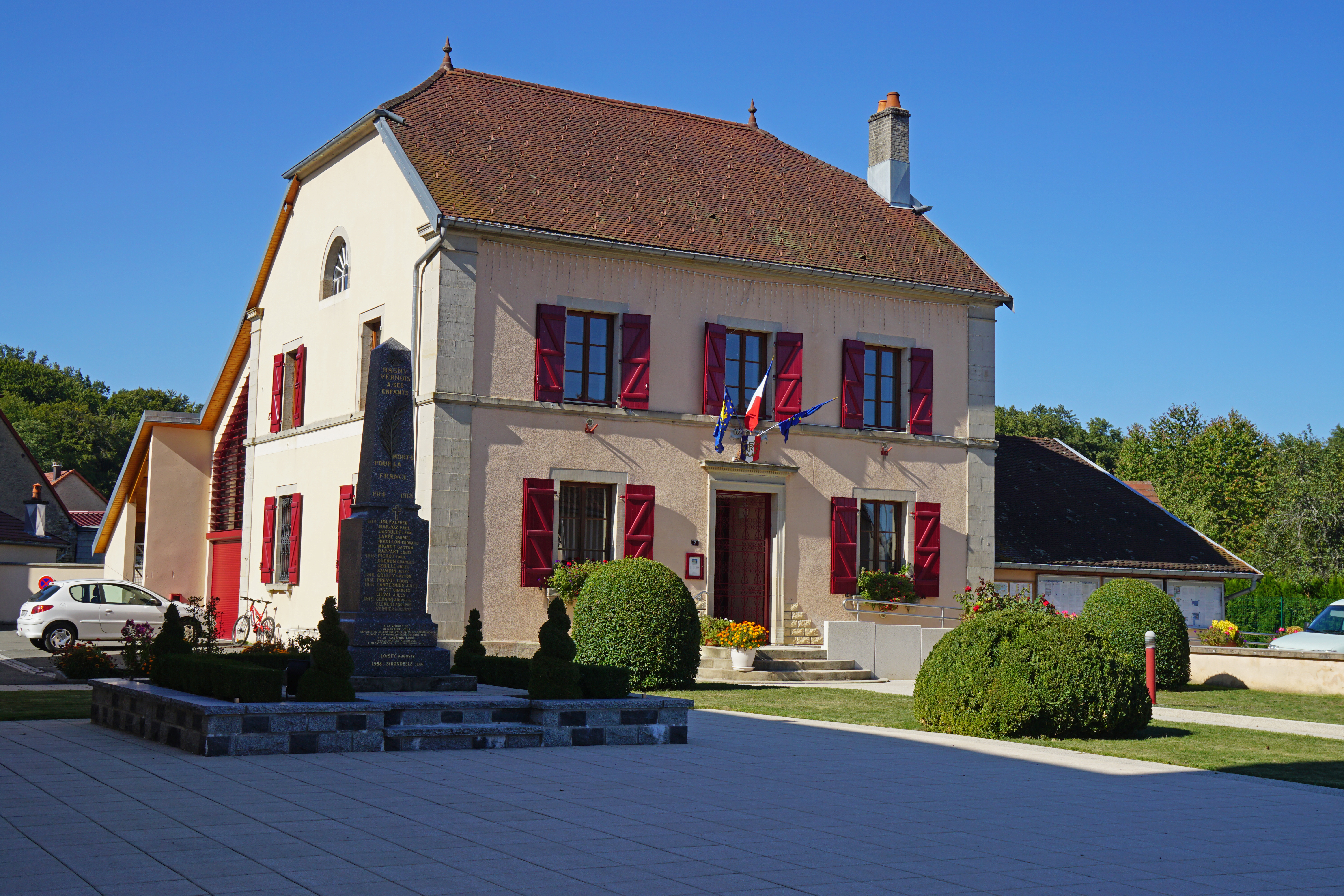 L mairie de Magny-Vernois 70.